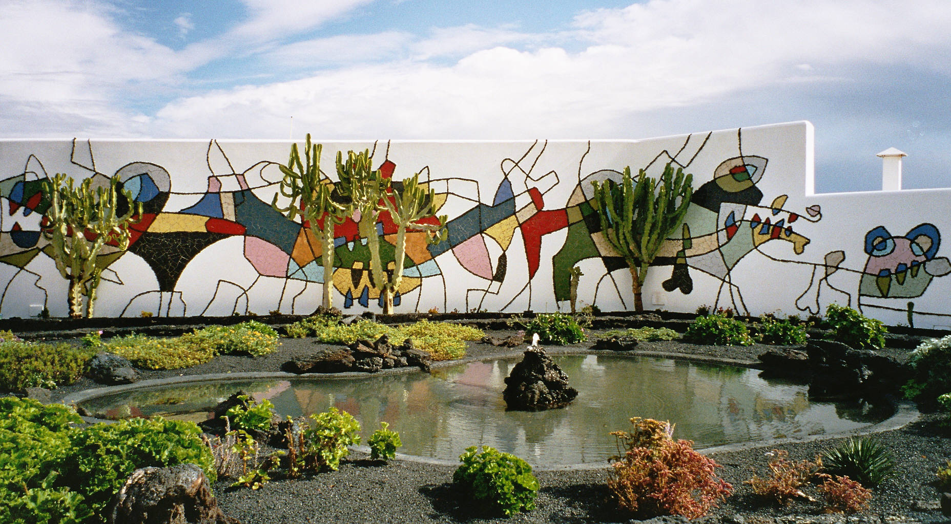 Fondación César Manrique, Near Tahiche, Lanzarote, Park Wall View